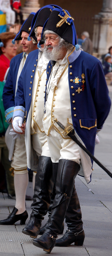 Ufficiali della Fanteria della Serenissima durante la rievocazione delle Pasque Veronesi